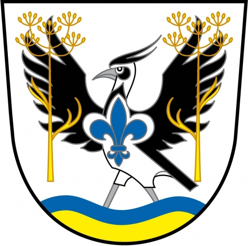 znak,Čejkovice , okres Znojmo